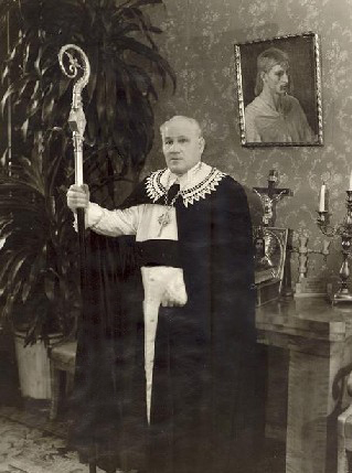 Latvijas evanģēliski luteriskās baznīcas arhibīskaps